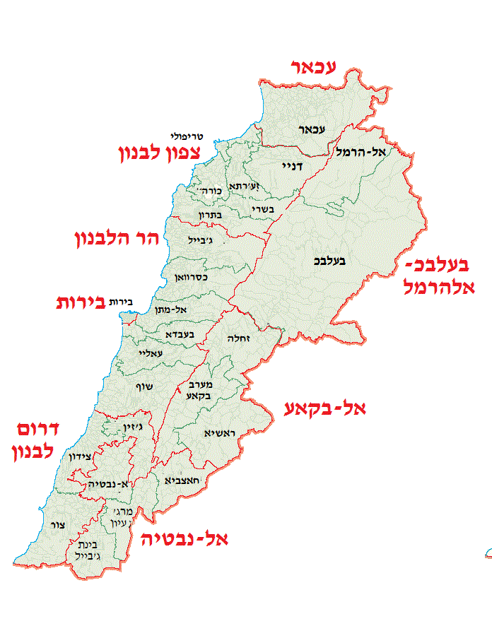 מפת נפות לבנון